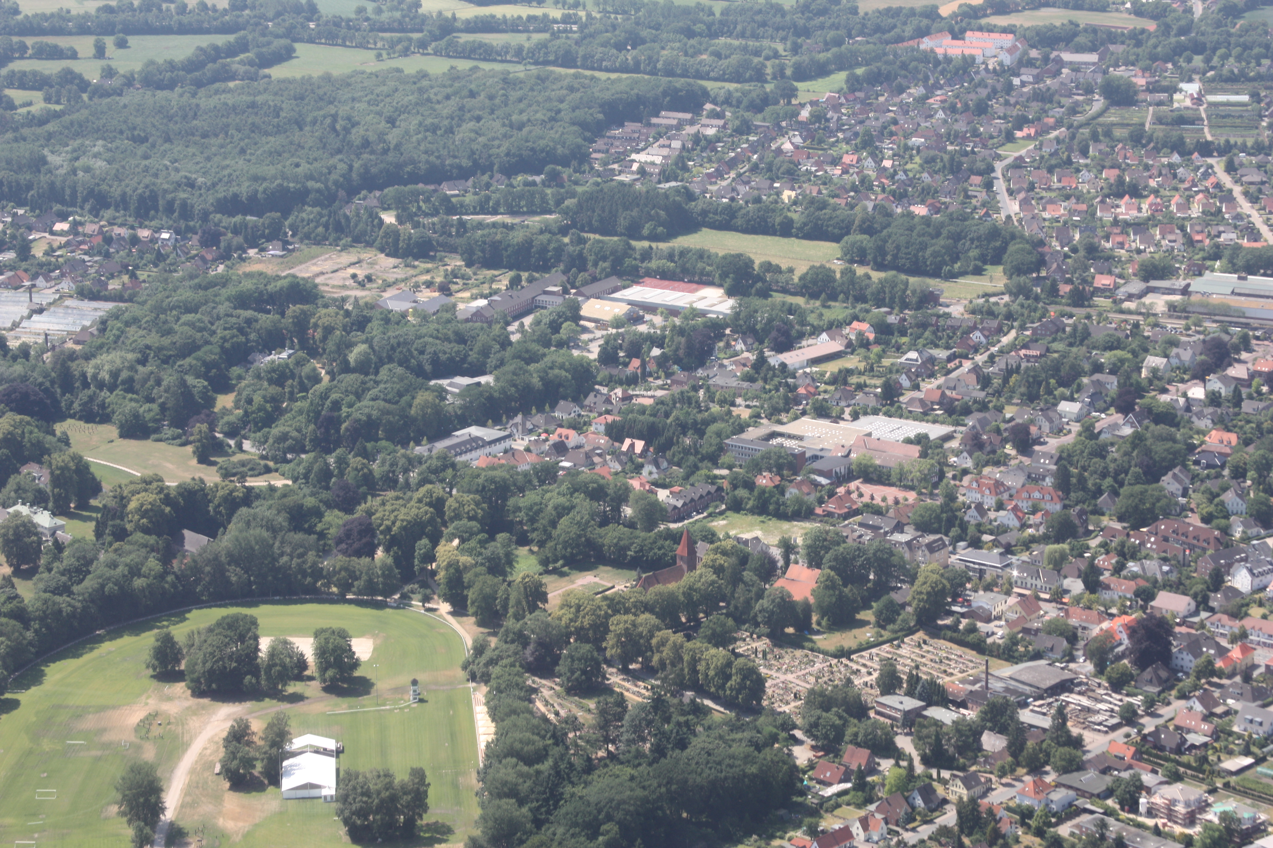 Flug über Rastede; von Varel kommend nach Oldenburg; Flughöhe 500 m = 1500 ft; Juli 2010